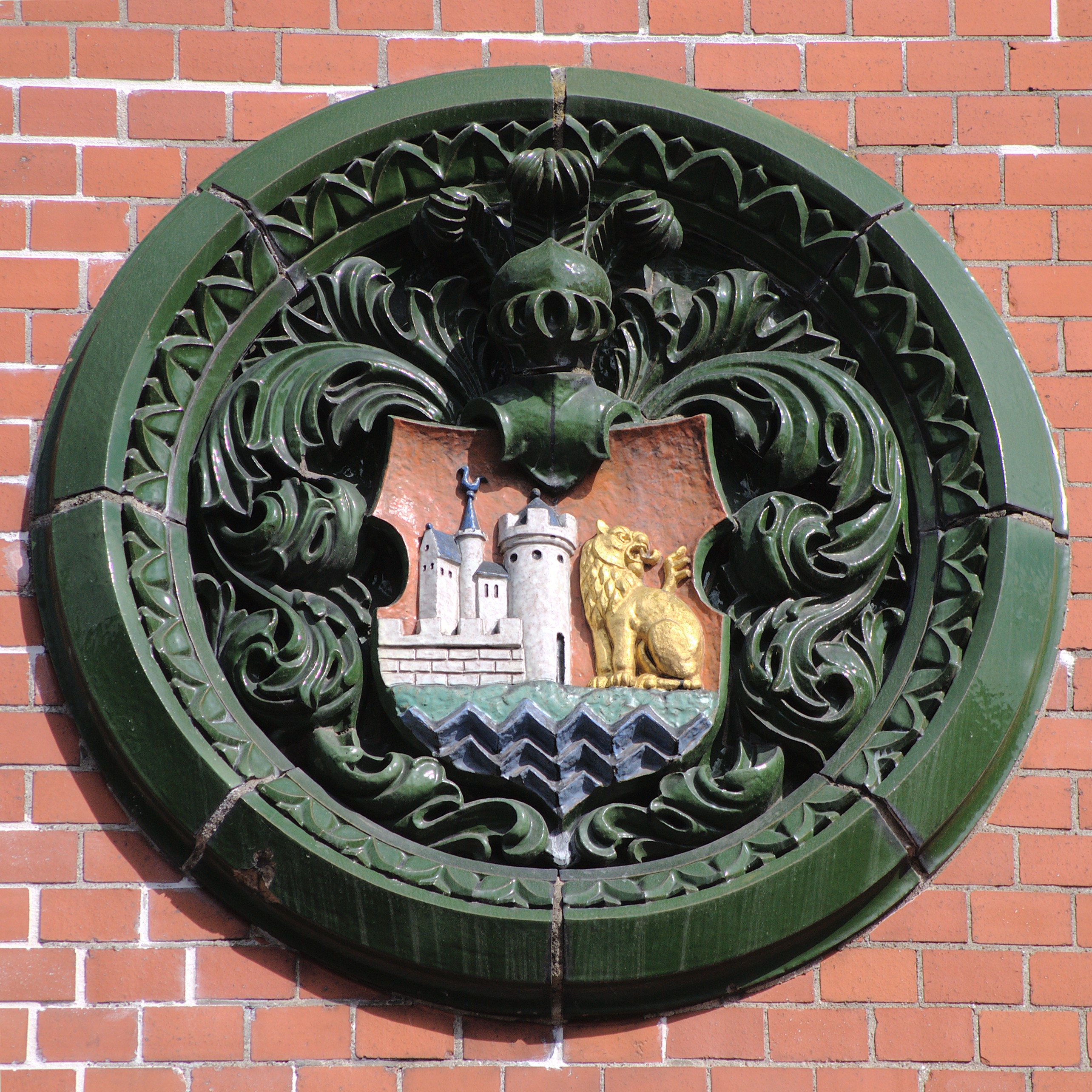 Ratusz w Lęborku. Rozeta z herbem.